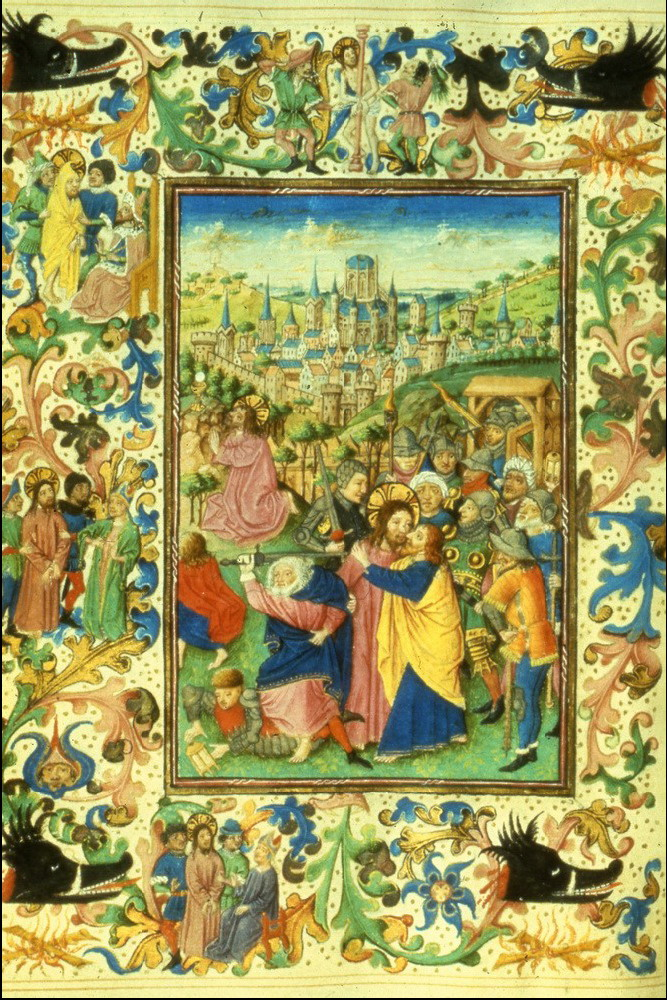 Miniaturen van de zgn. Meester van Gijsbrecht van Brederode in het Getijdenboek van Gijsbrecht van Brederode, ca.1465-70 (Universiteitsbibliotheek Luik, Ms. Wittert 23)